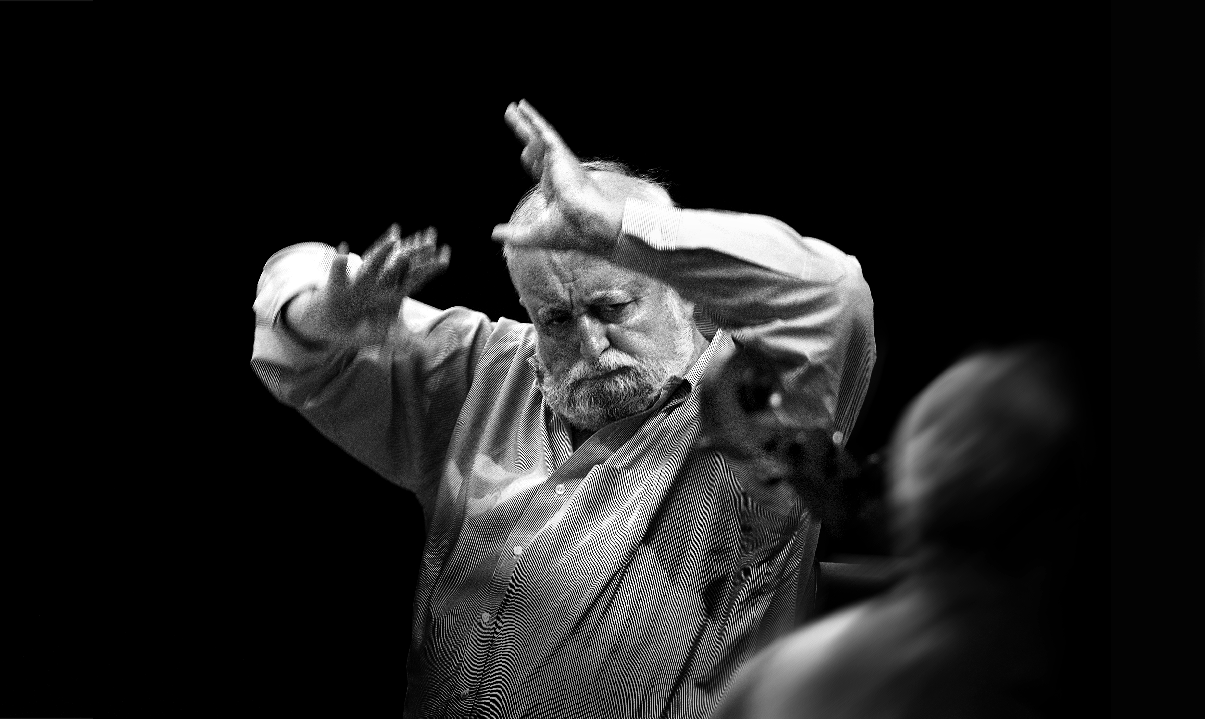 Krzysztof Penderecki, fot.Mirosław Pietruszyński